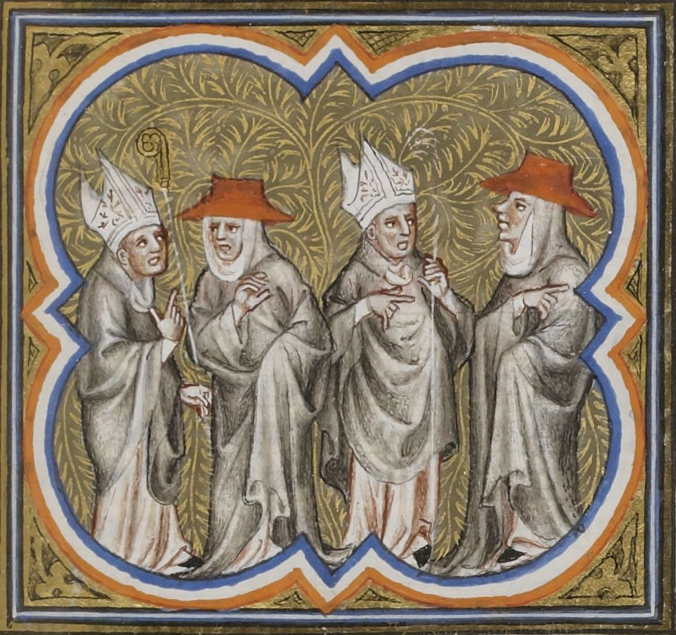 Enluminure symbolisant le Schisme de 1130